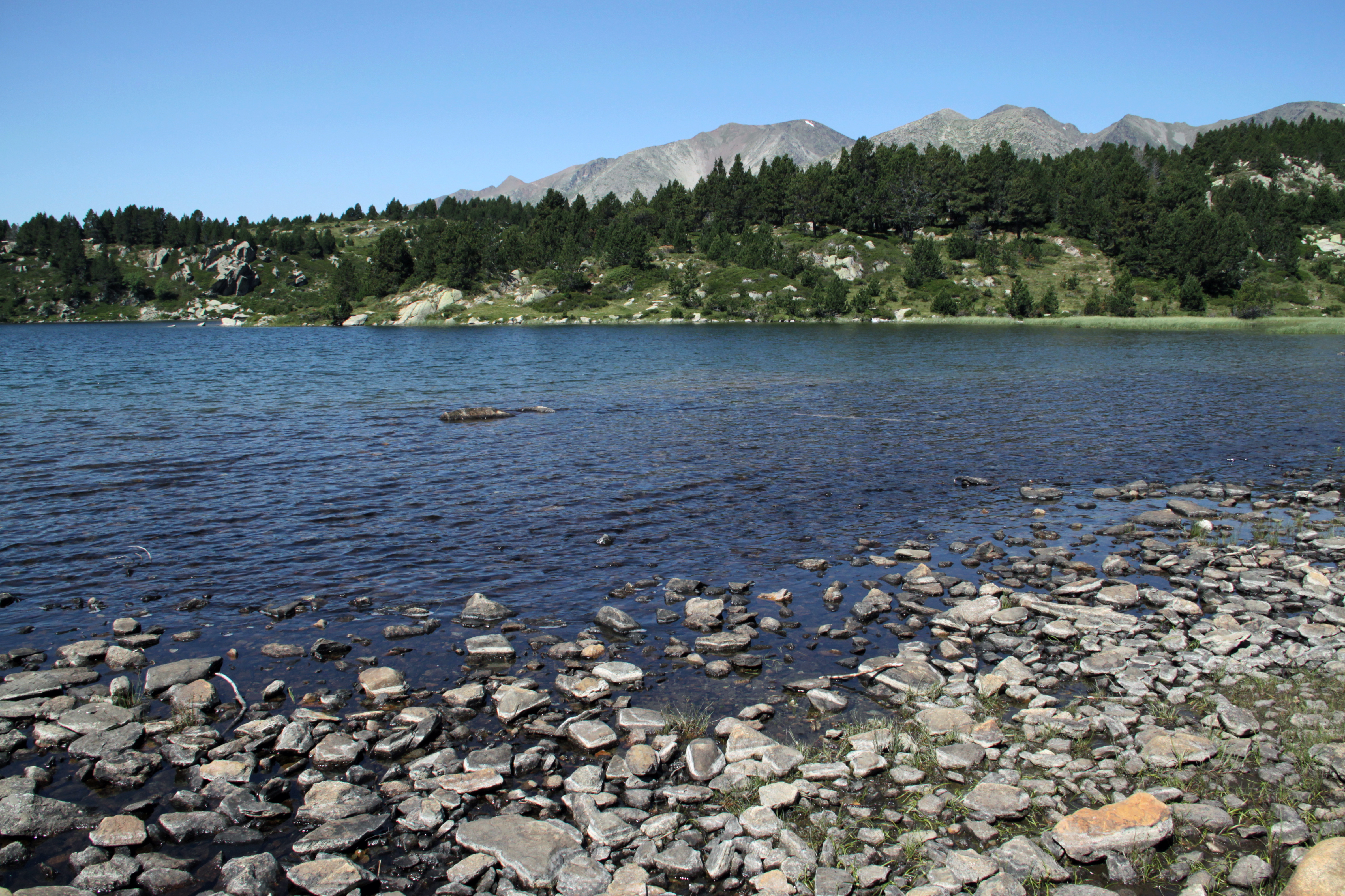 L'Estany Negre ( l'étang noir ), un des étangs du Carlit . Superficie : 4,5 hectares. Profondeur : 7 mètres. Altitde : 2140 mètres.